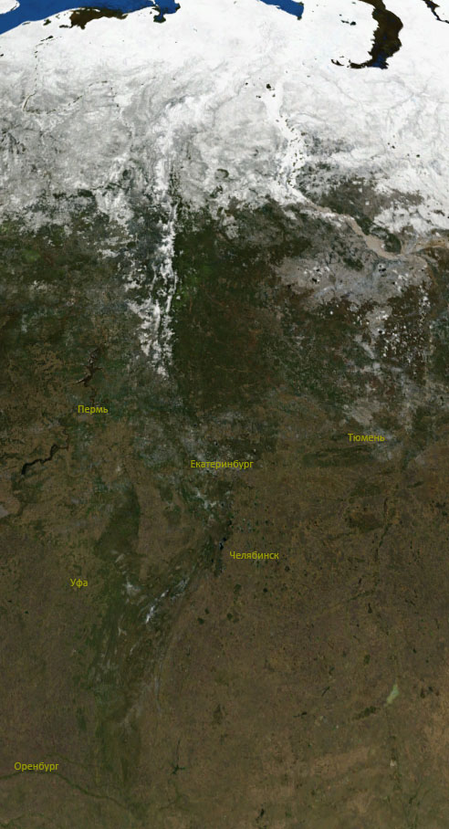 Уральские горы